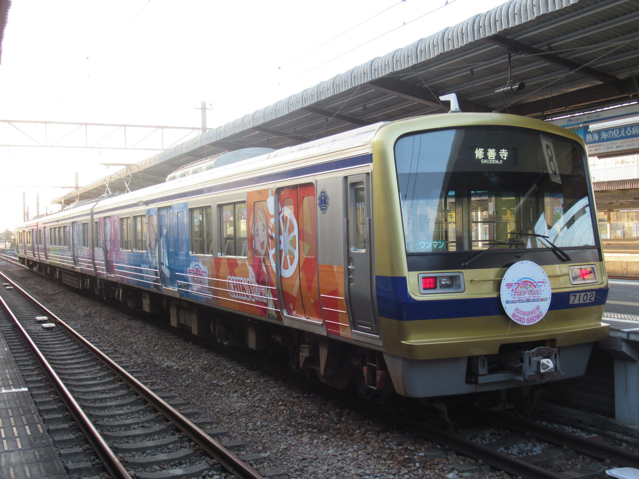 伊豆箱根鉄道7102 『ラブライブ!サンシャイン!!』ラッピング車両